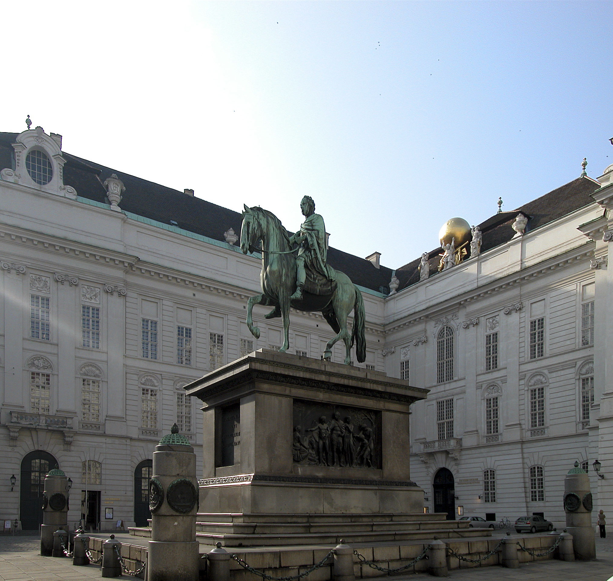 Der Josephsplatz in Wien Source: Alexander Umbricht, 2. Okt. 2002